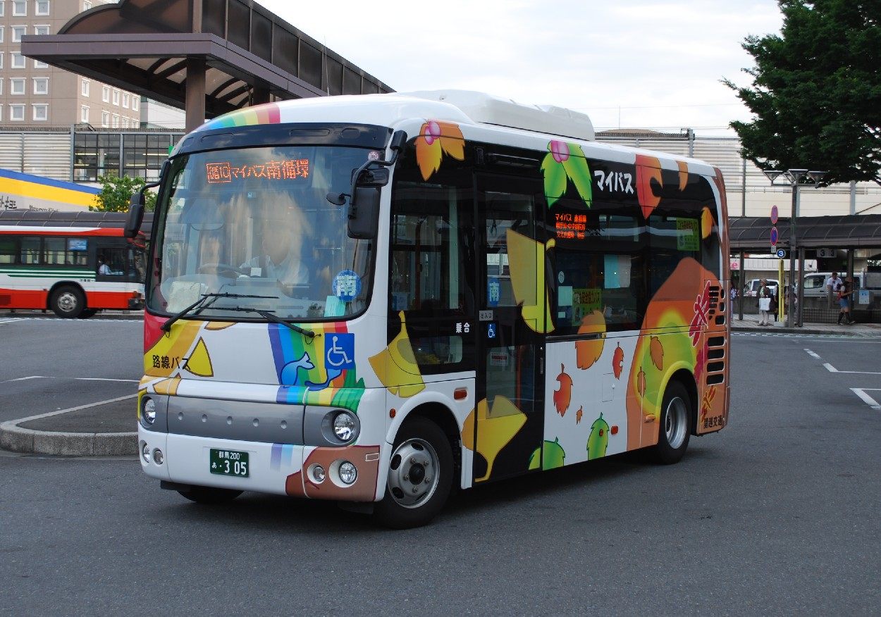 群馬県前橋市のコミュニティバス「マイバス」南循環。関越交通の車両。前橋駅北口駅前広場で撮影。